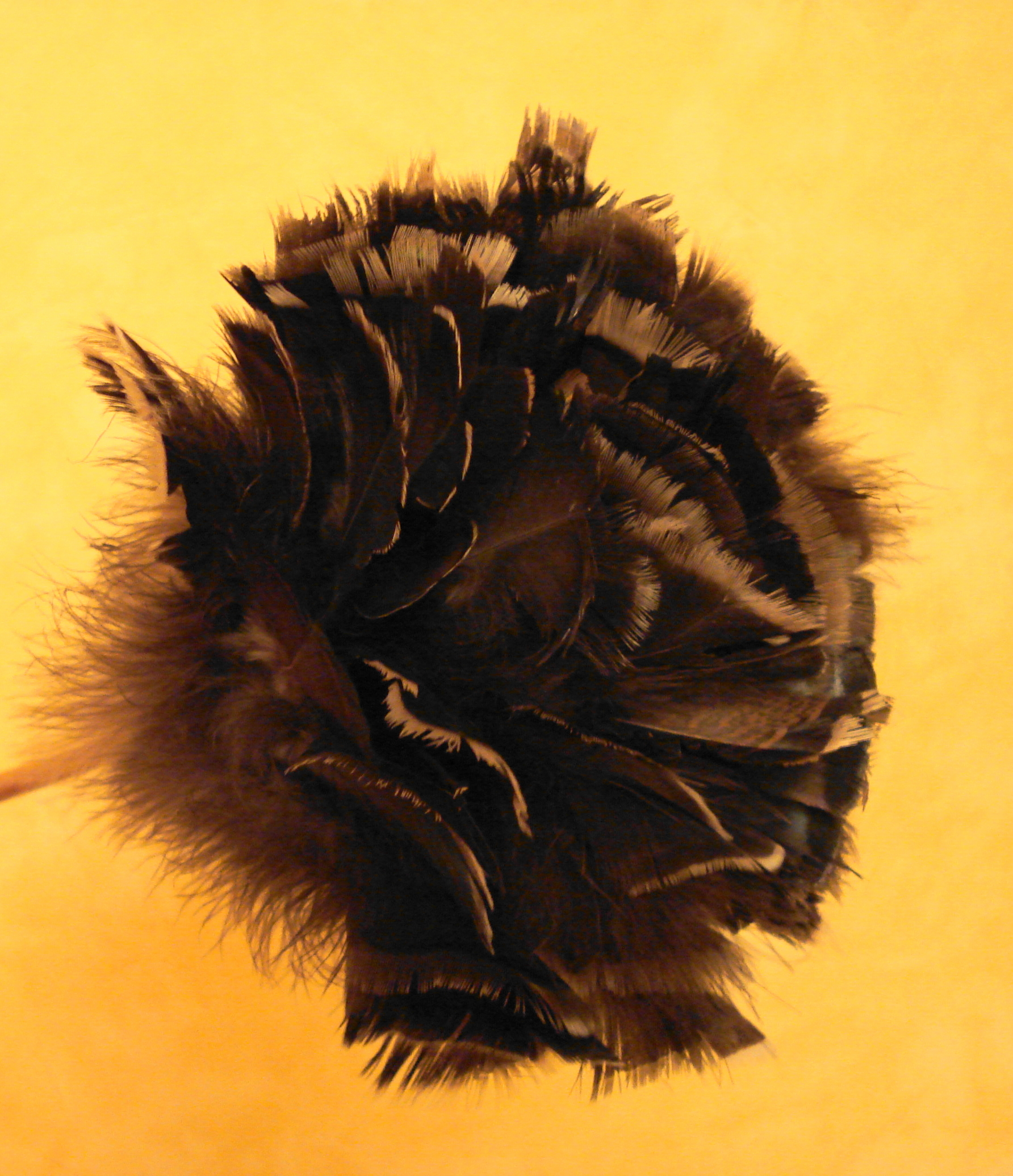 Photo d'un plumeau